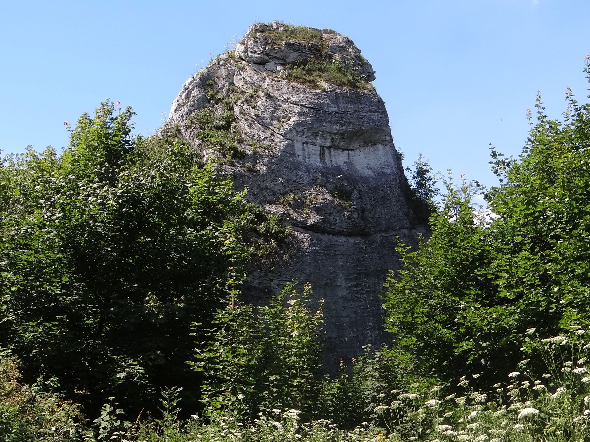 Skała Czubatka na Podzamczu. widok od strony wschodniej